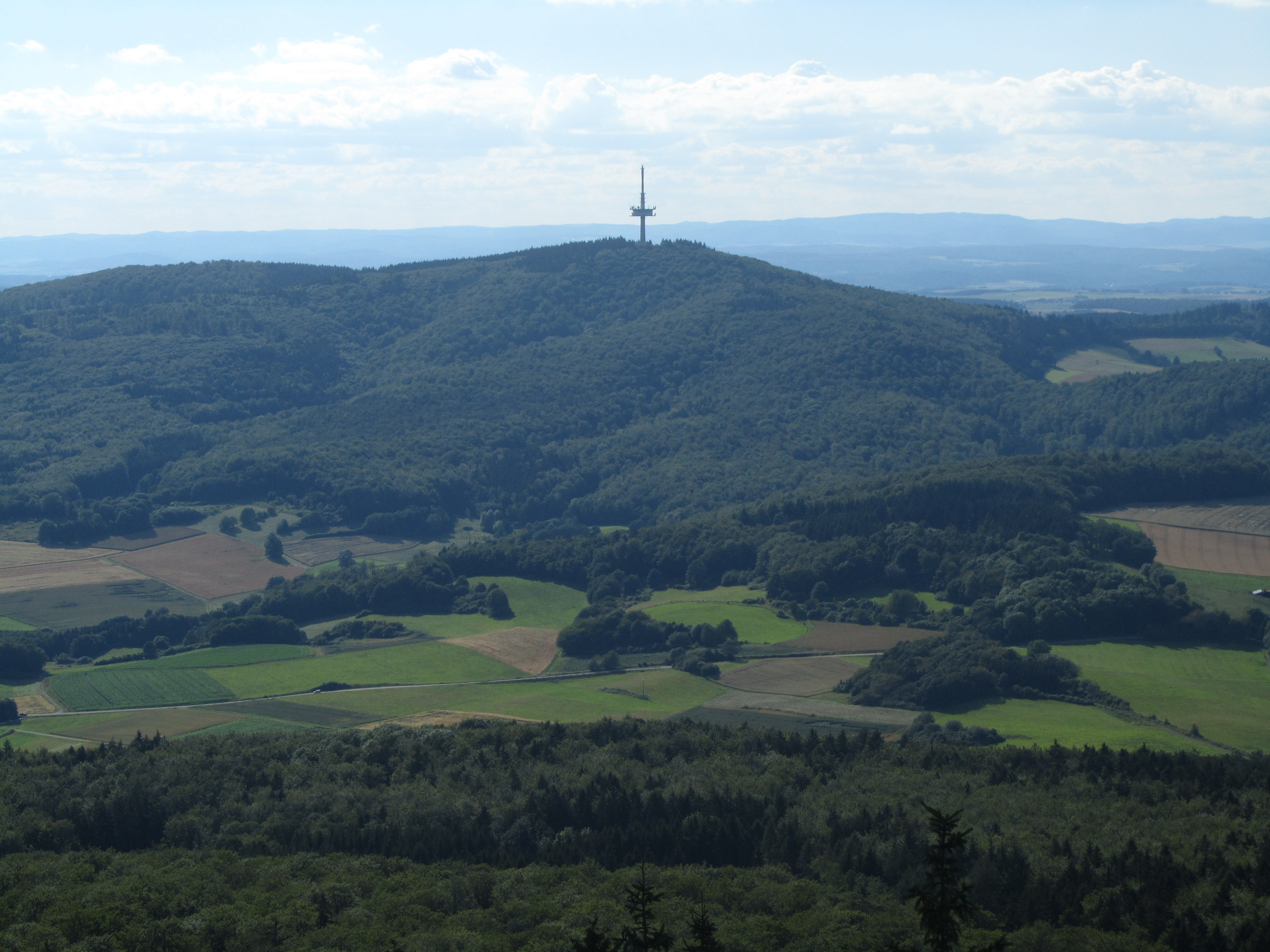 Das Hohe Lohr (657 m) im Kellerwald (Hessen), fotografiert vom Aussichtsturm auf dem Wüstegarten (675 m). Im Hintergrund Teile des Rothaargebirges.